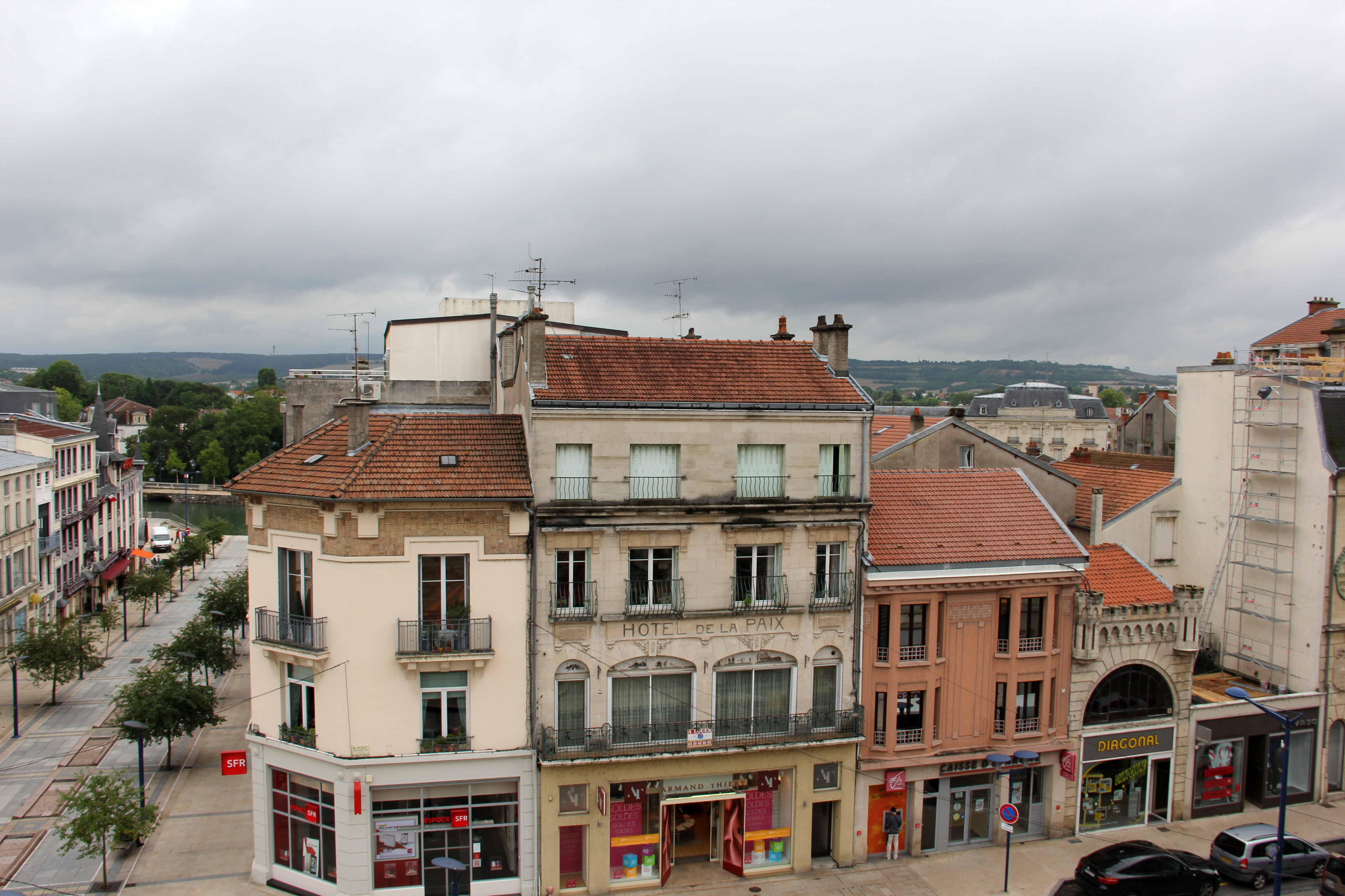 Blick vom Siegesdenkmal in Verdun zum unteren Teil der Stadt, Richtung Maas.